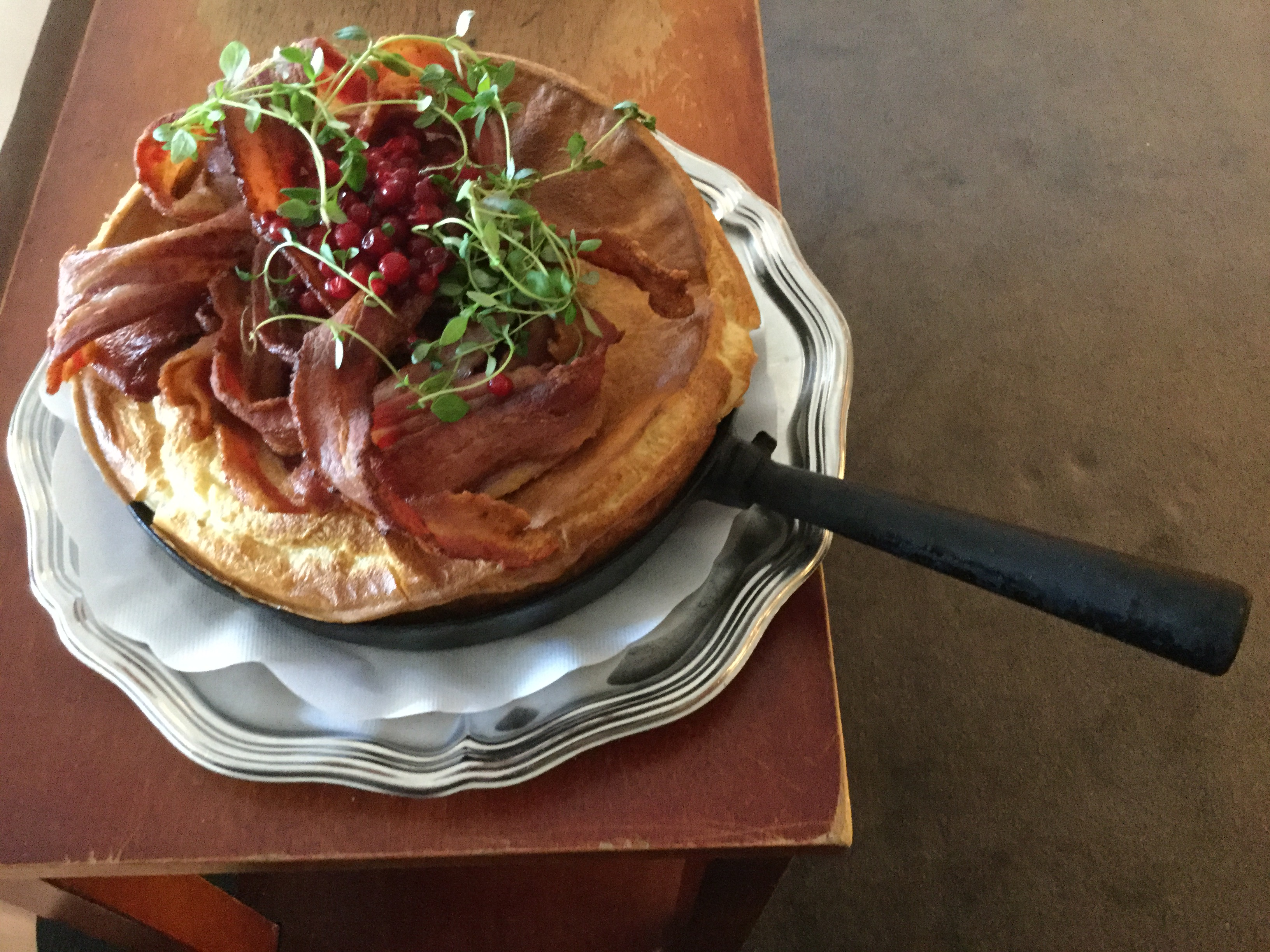 Äggakaka med fläsk, rårörda lingon och ärtskott på Spångens Gästgivaregård i Ljungbyhed, maj 2017